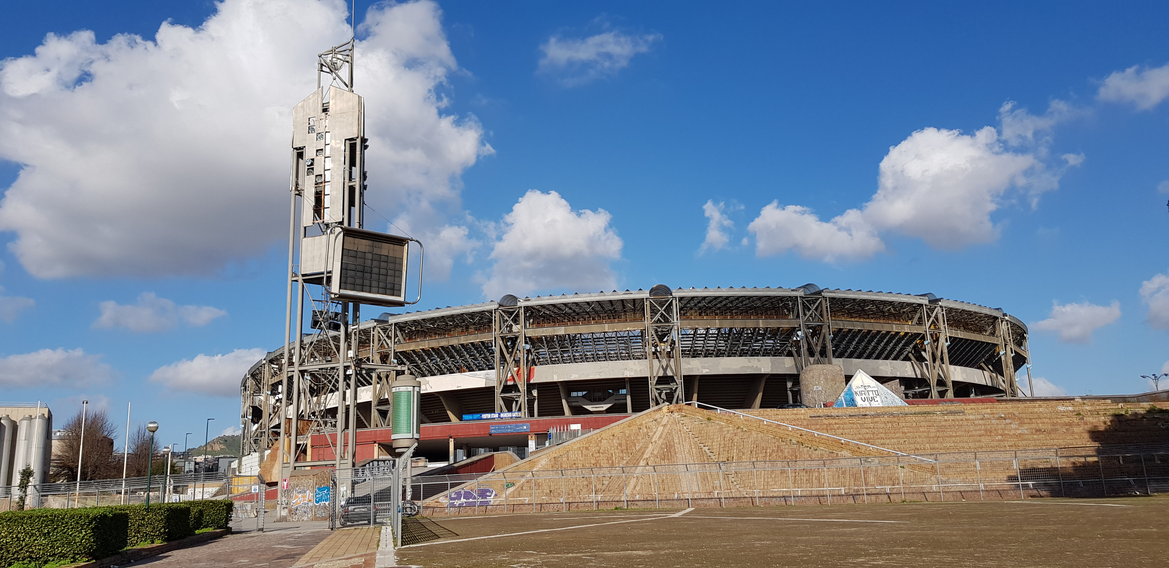 Lo stadio San Paolo e la Torre dell'Informazione